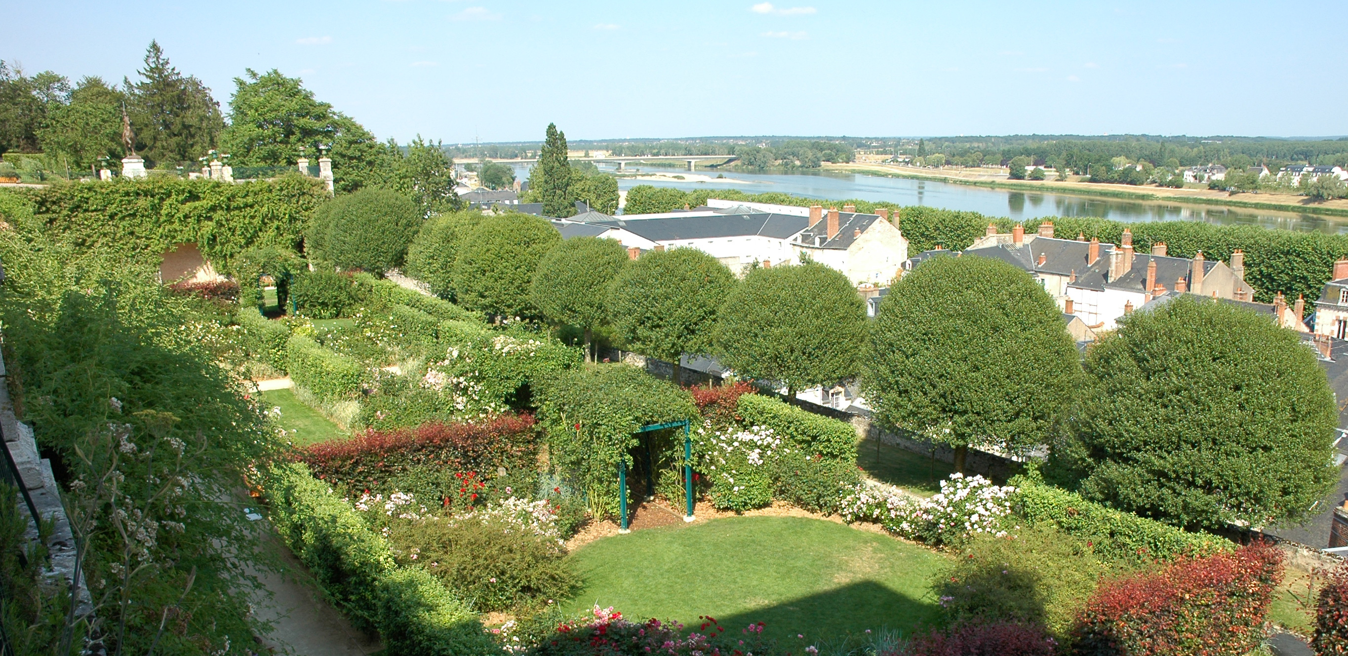 À Blois (Loir-et-Cher, France) : roseraie des jardins de l'évêché (aujourd'hui hôtel de ville).